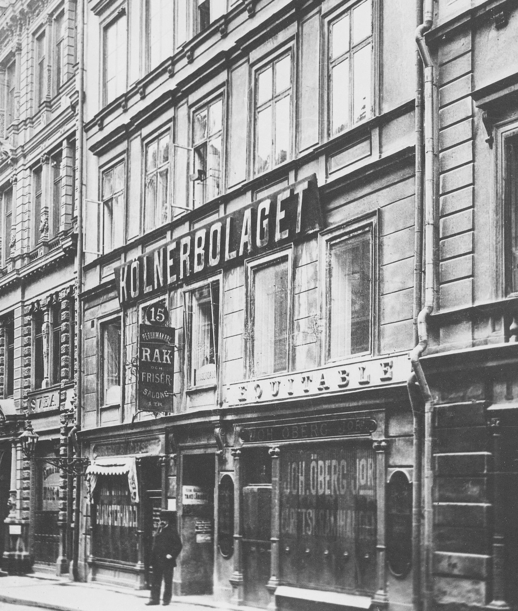 Drottninggatan 15, fastigheten Loen 5